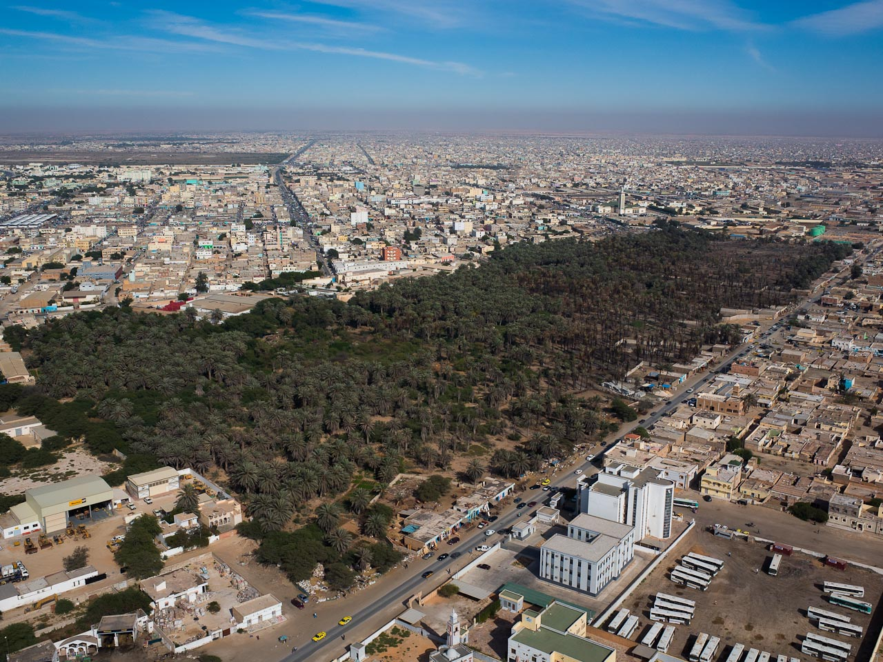 Nouakchott est la capitale de la Mauritanie depuis 1957, au bord de l'océan Atlantique